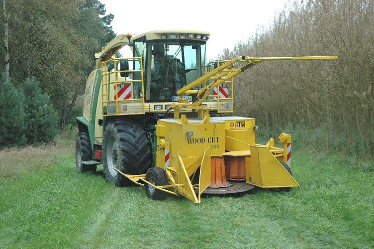 Feldhäcksler „Krone Big X 650“ mit Vorsatz „Wood Cut 1500“ der Firma HTM für Holzernte in Schnellwuchsplantagen